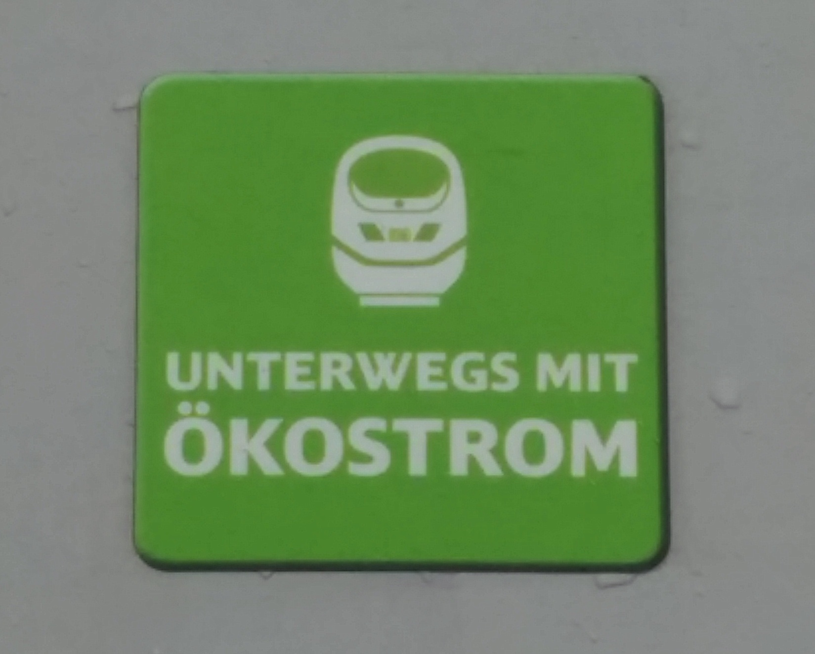 Ökostromlabel an einer ICE-Tür der Deutschen Bahn